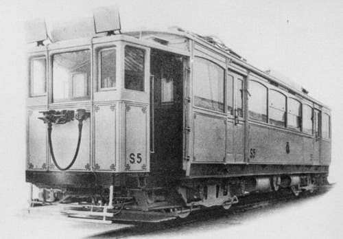 Fotografía del coche 5 de la primera serie, tomada en la fábrica La Brugeoise en la ciudad belga de Brujas antes de ser enviado a Buenos Aires.